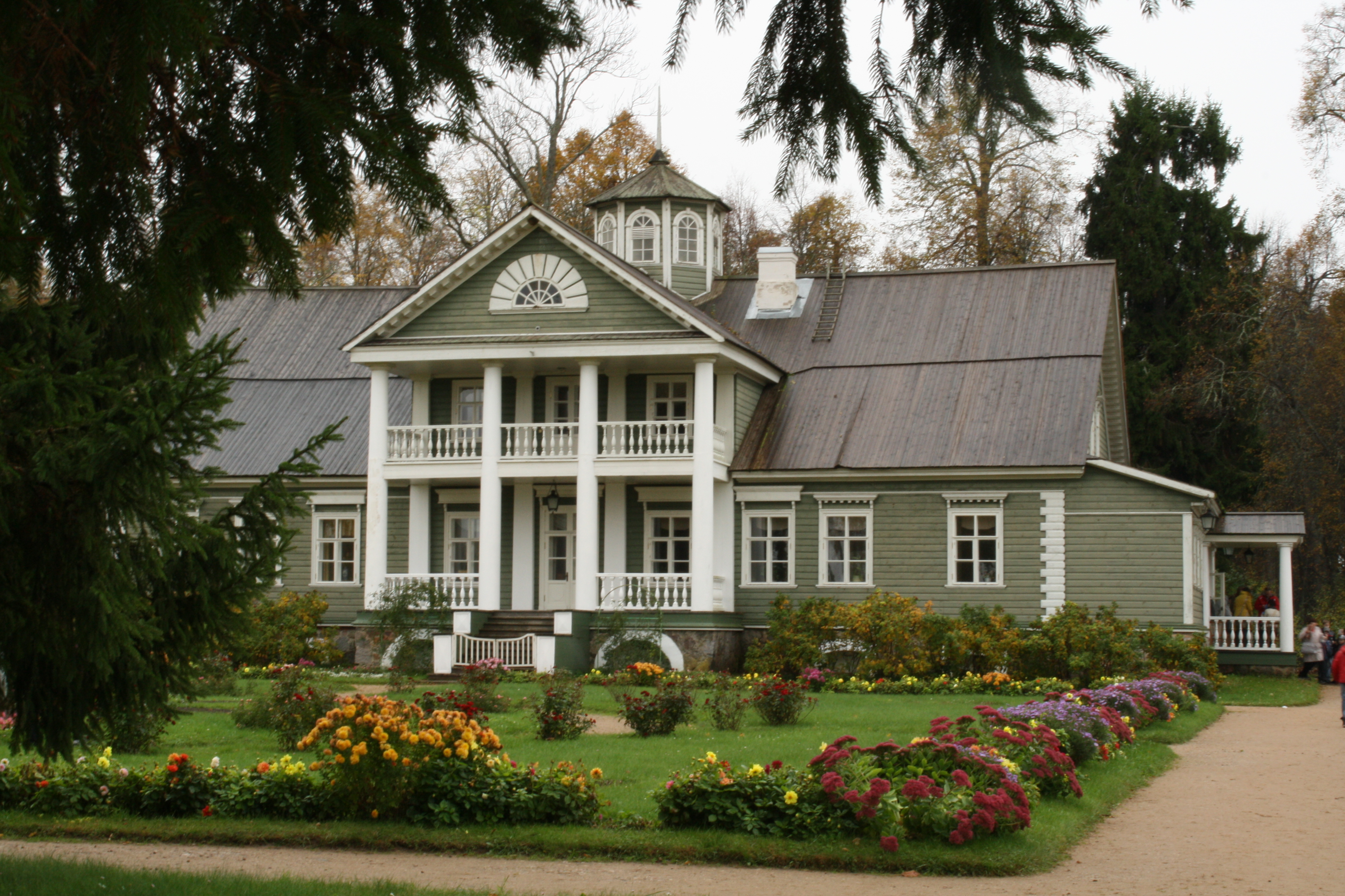 Фотография со стороны амбара